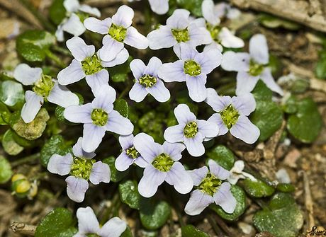 Planta Jonopsidium acaule